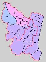 宮崎県東諸県郡の町村制時点の町村。